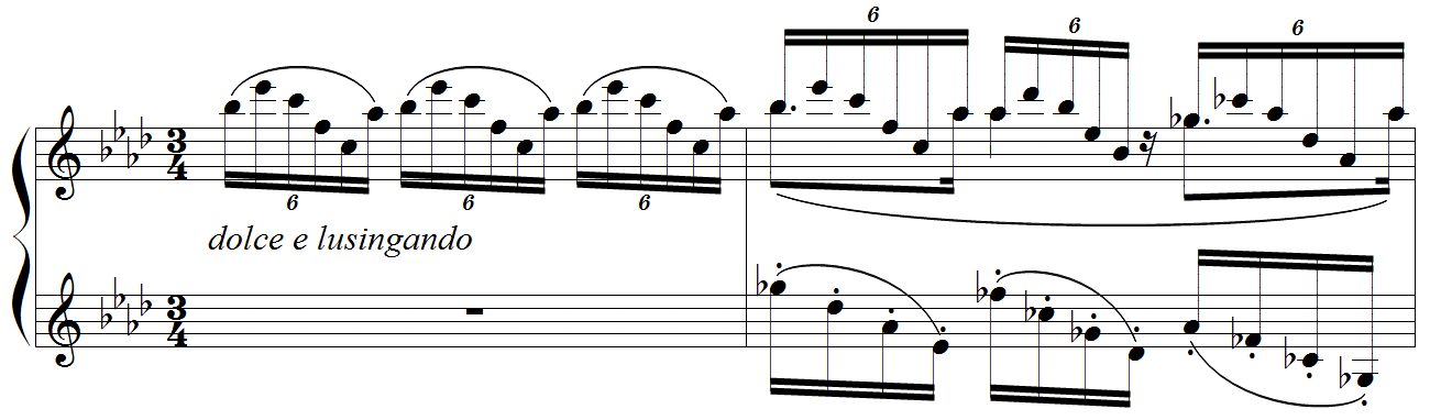 Debussy - Etude "pour les arpèges composés", mes.1-2